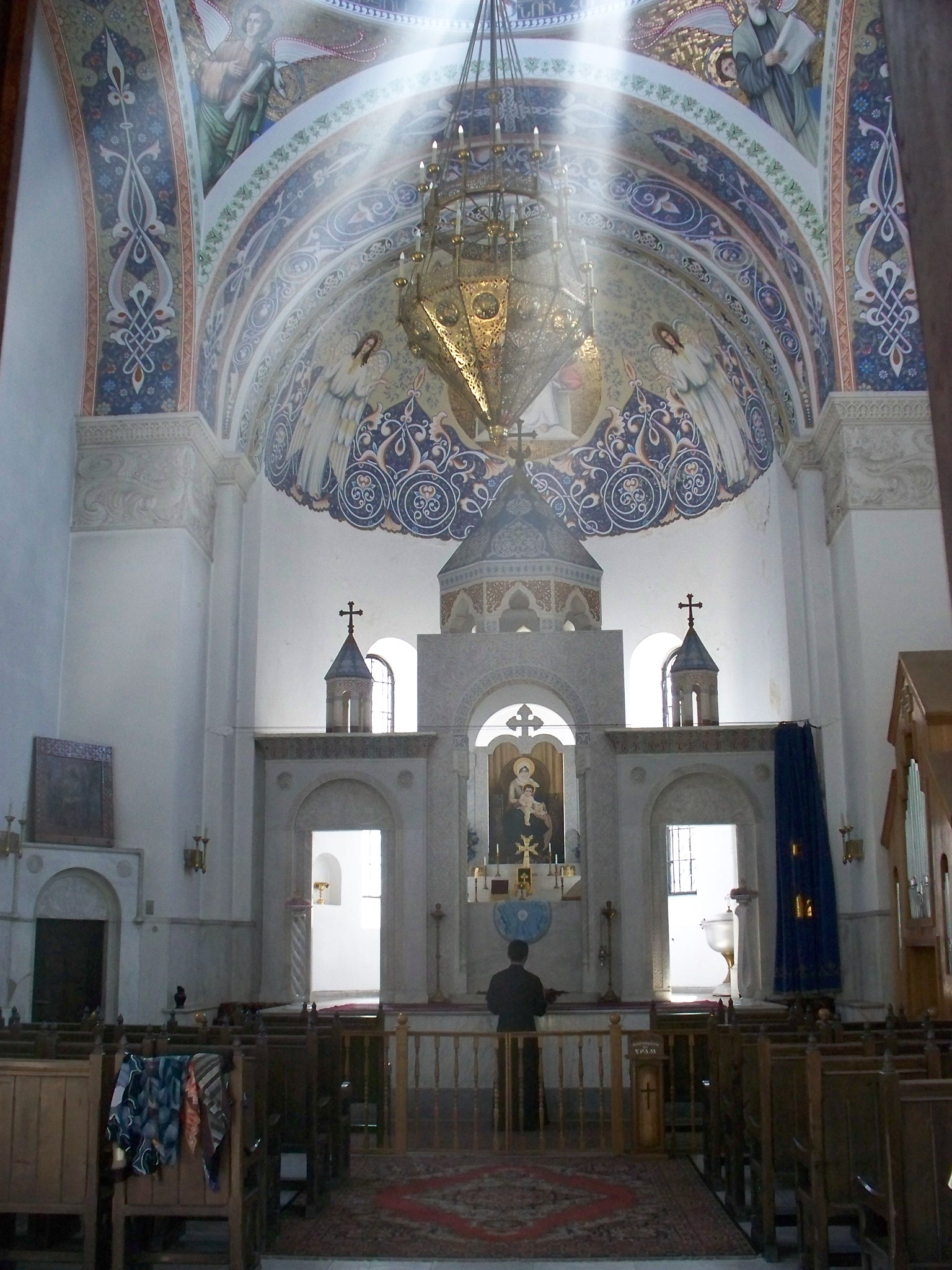 Церква вірменська, Ялта, вул. Загородня, 3, літ. А